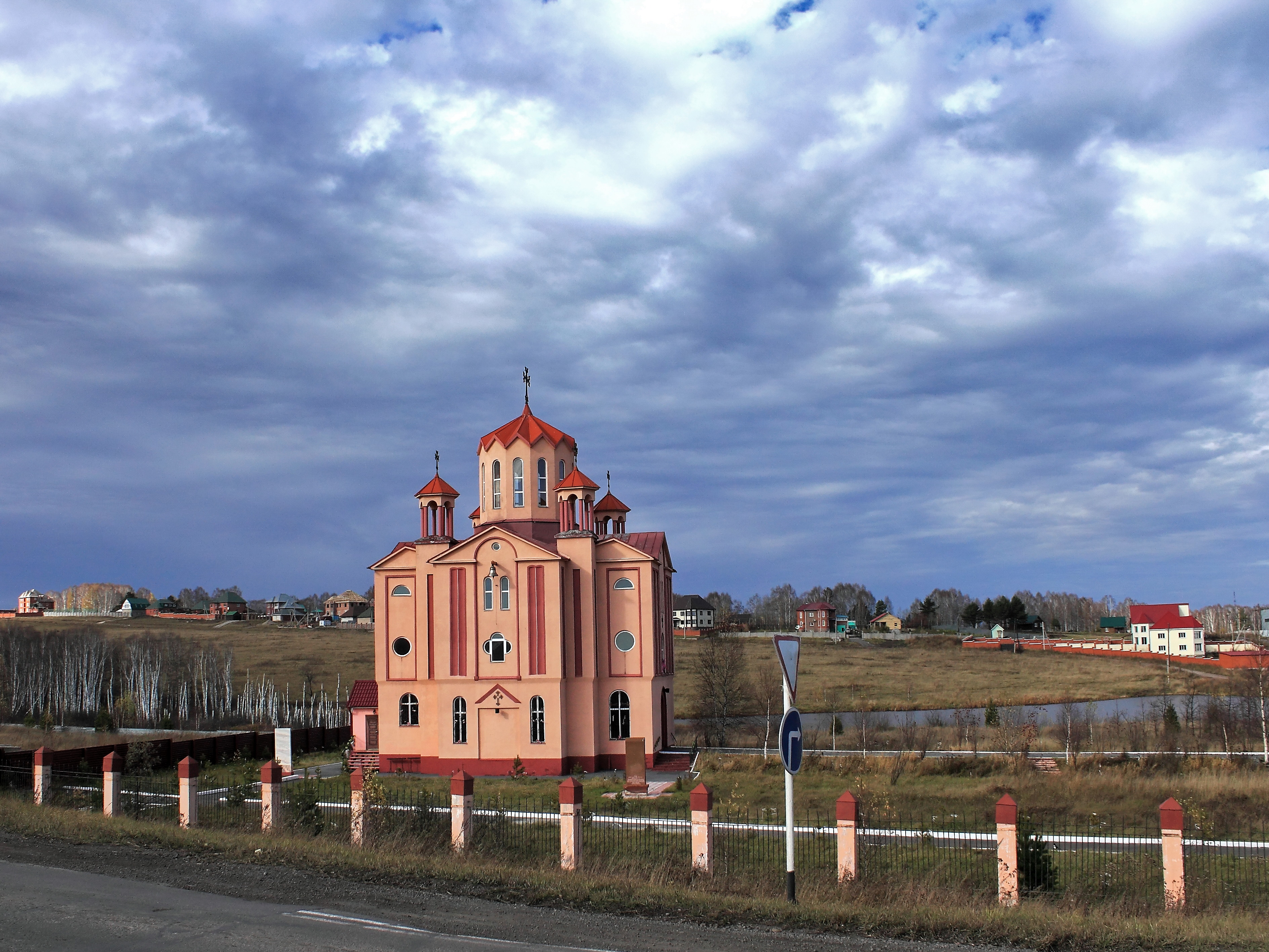 Храм Святого Григория Просветителя